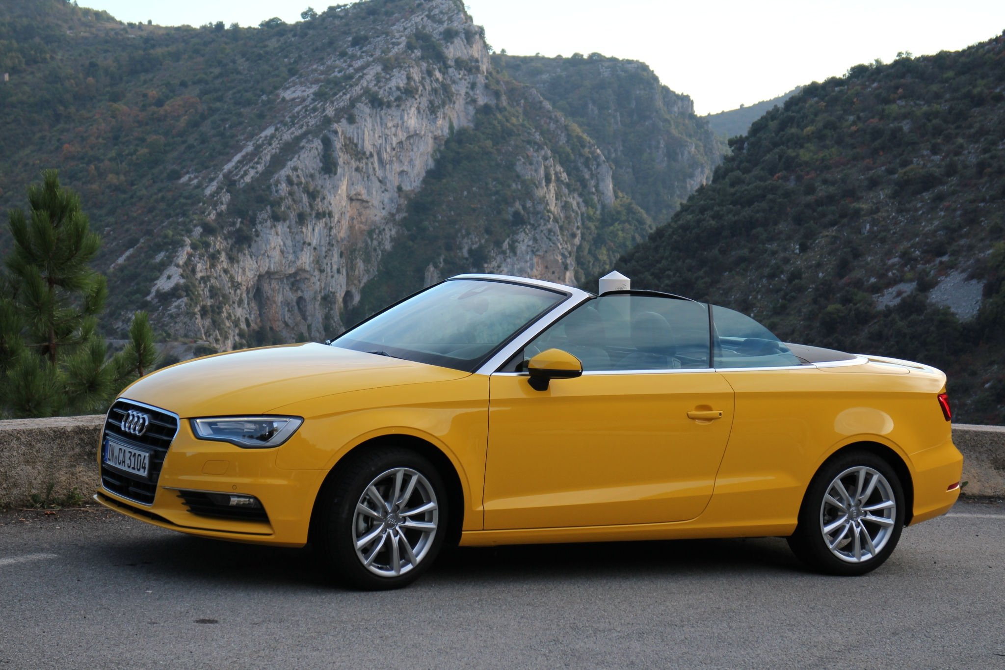 Audi A3 Cabrio 2013